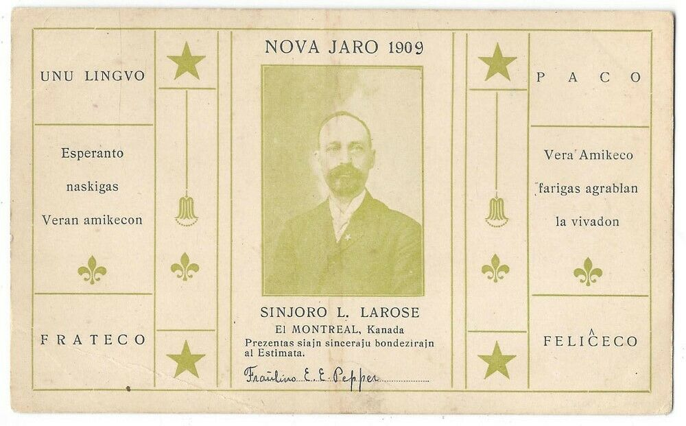 Novjara karto en Esperanto de Ludger Larose por la jaro 1909 sendita al esperantistino en Britio